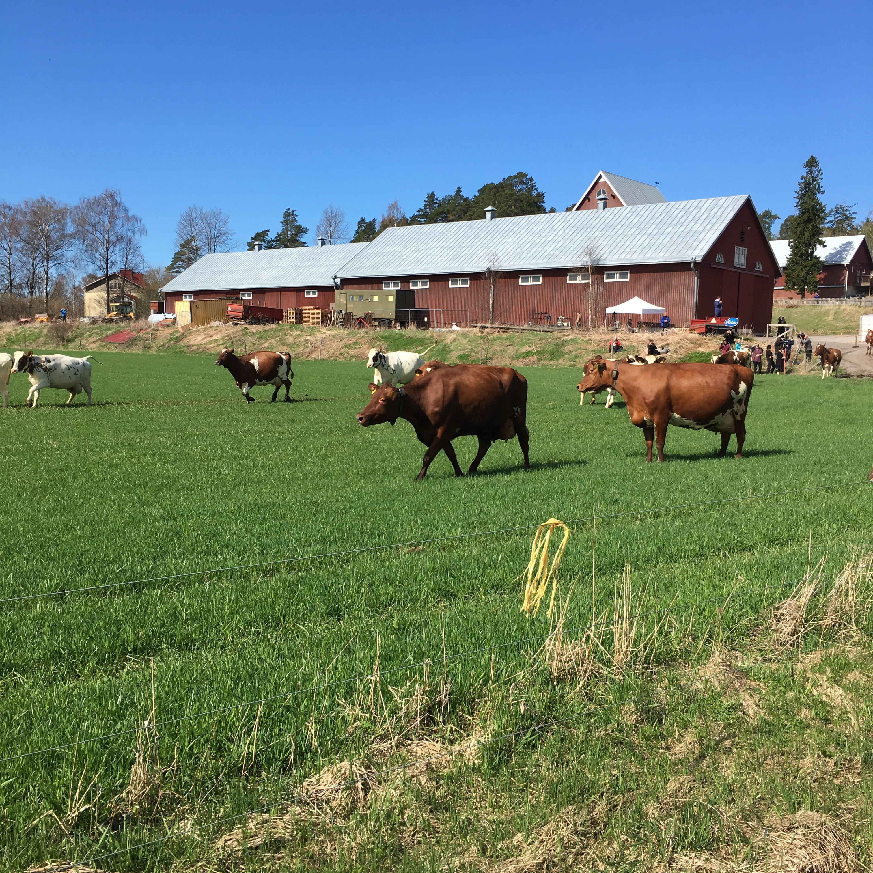 Lehmien laitumellelasku Viikin opetus- ja koetilalla